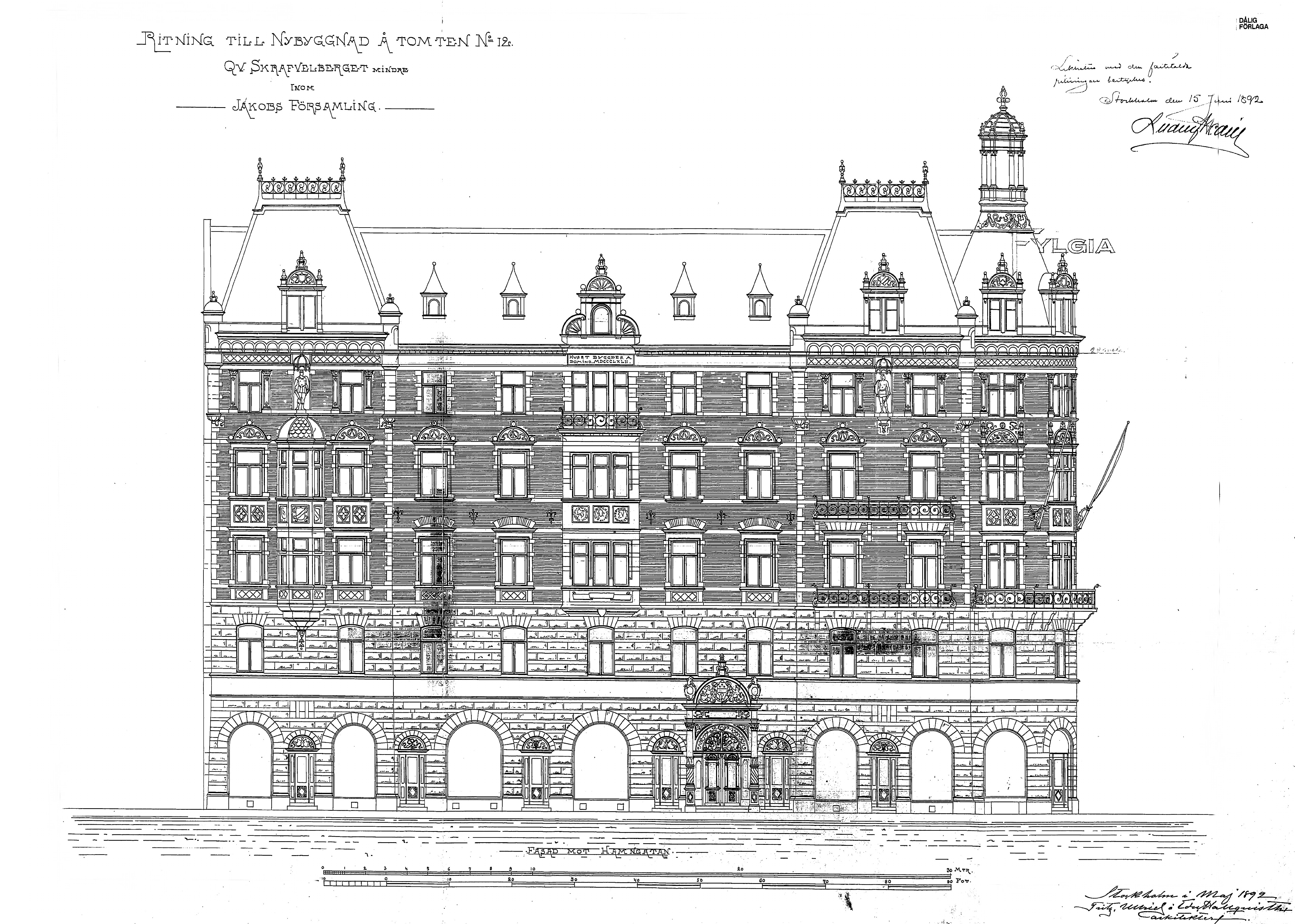 Skravelberget mindre 12, fasadritning (mot Hamngatan)